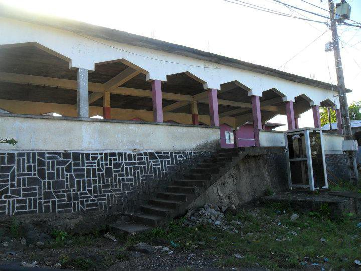 marché de Chouani (upload : Karim M.)